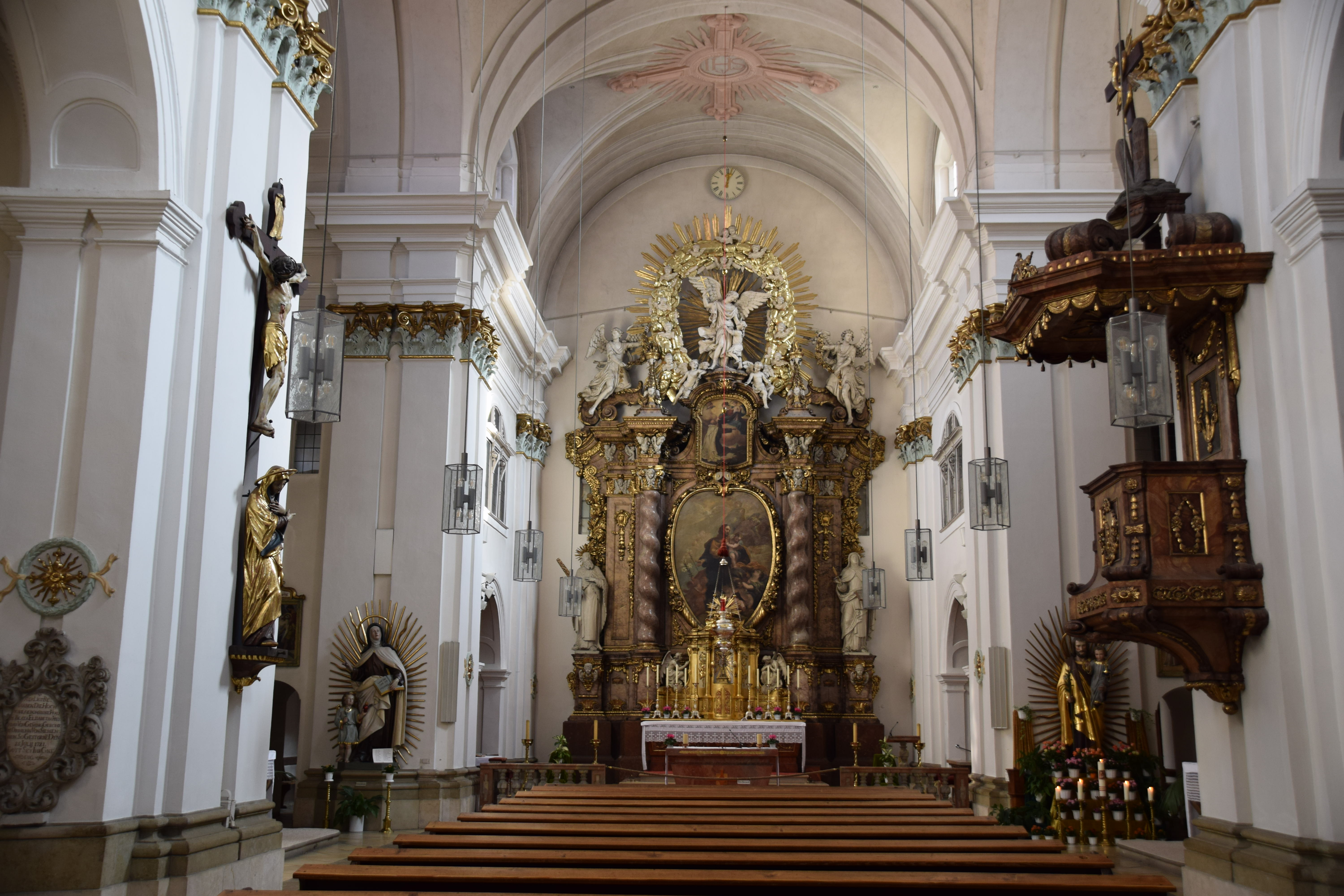 Innenansicht der Karmelitenkirche St. Josef am Alten Kornmarkt in Regensburg